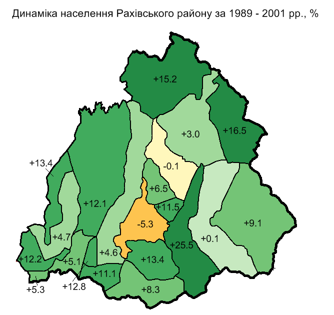 Динаміка населення Рахівського району за 1989 - 2001 рр. / Population dynamics of Rakhiv raion,1989-2001